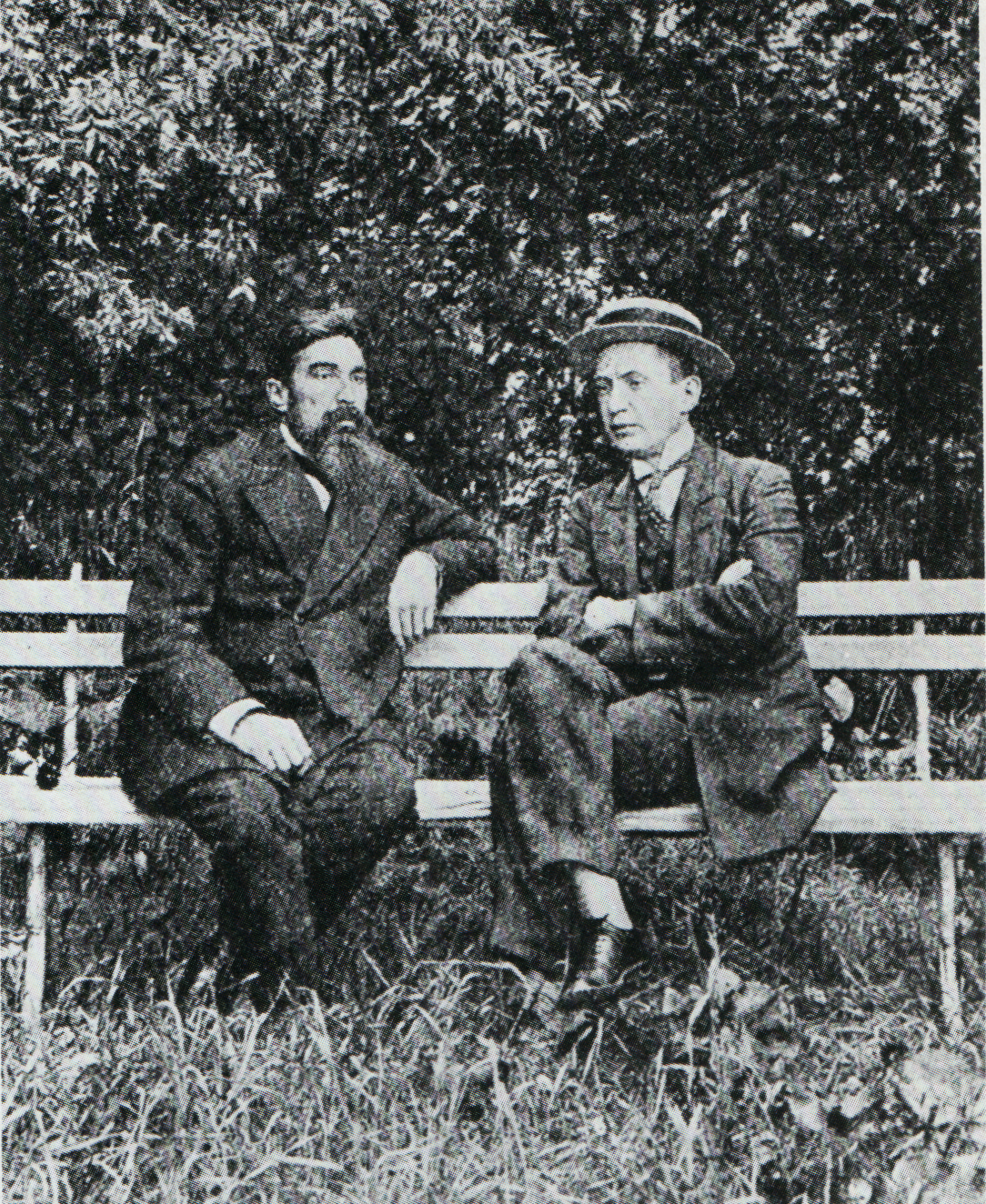 Los trudoviki Dzyubinski y Kérenski en los jardines del Palacio Taúride en 1916.